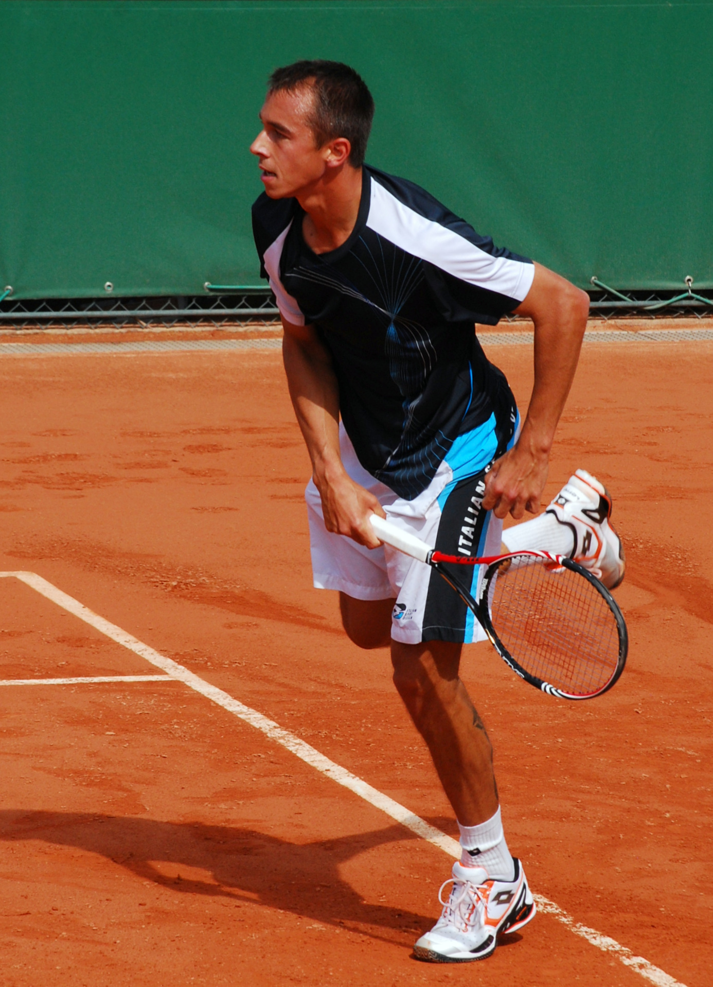 Roland Garros 2011.